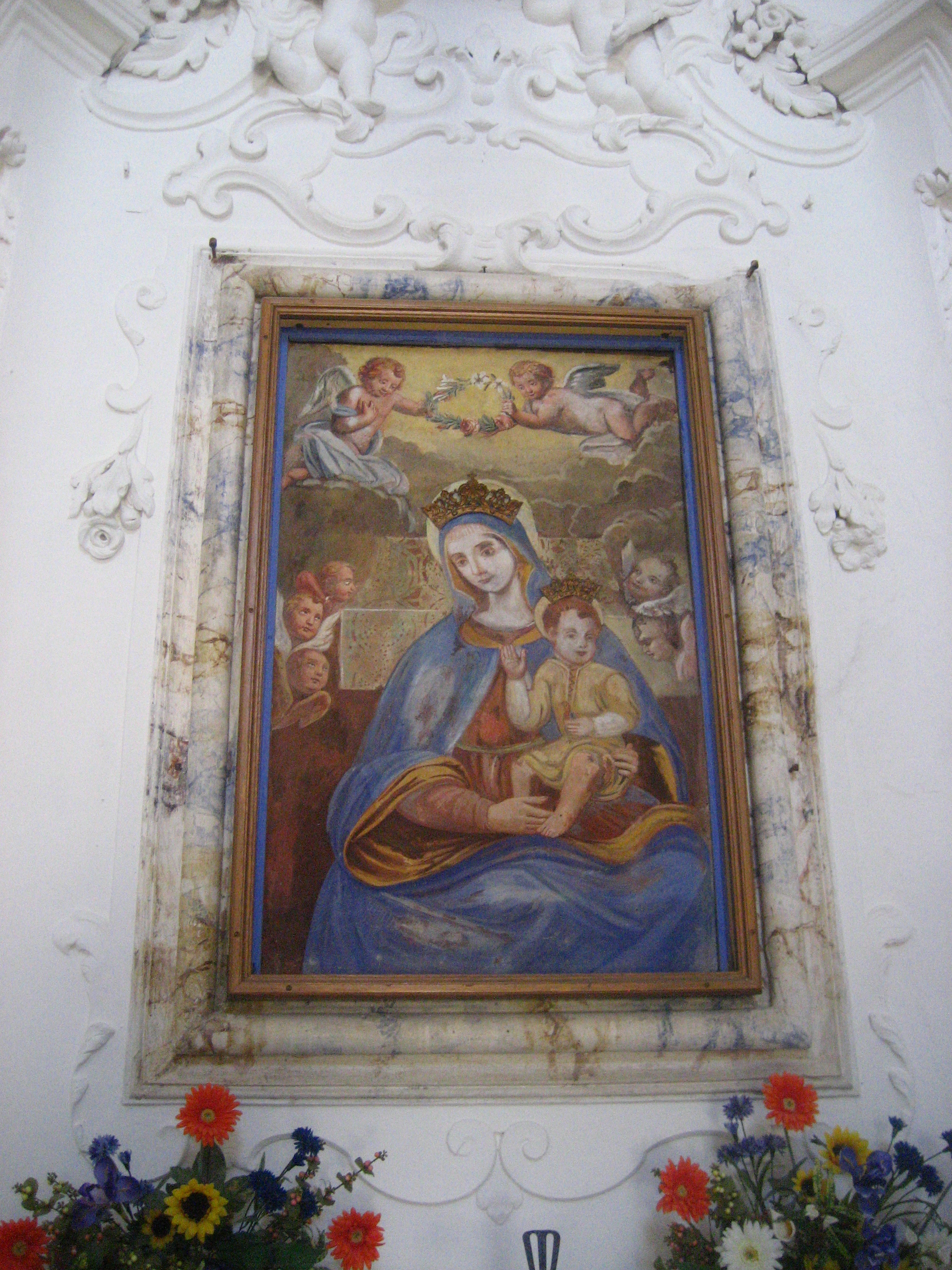 Beatissima Vergine dei Confini (Montone - Perugia)